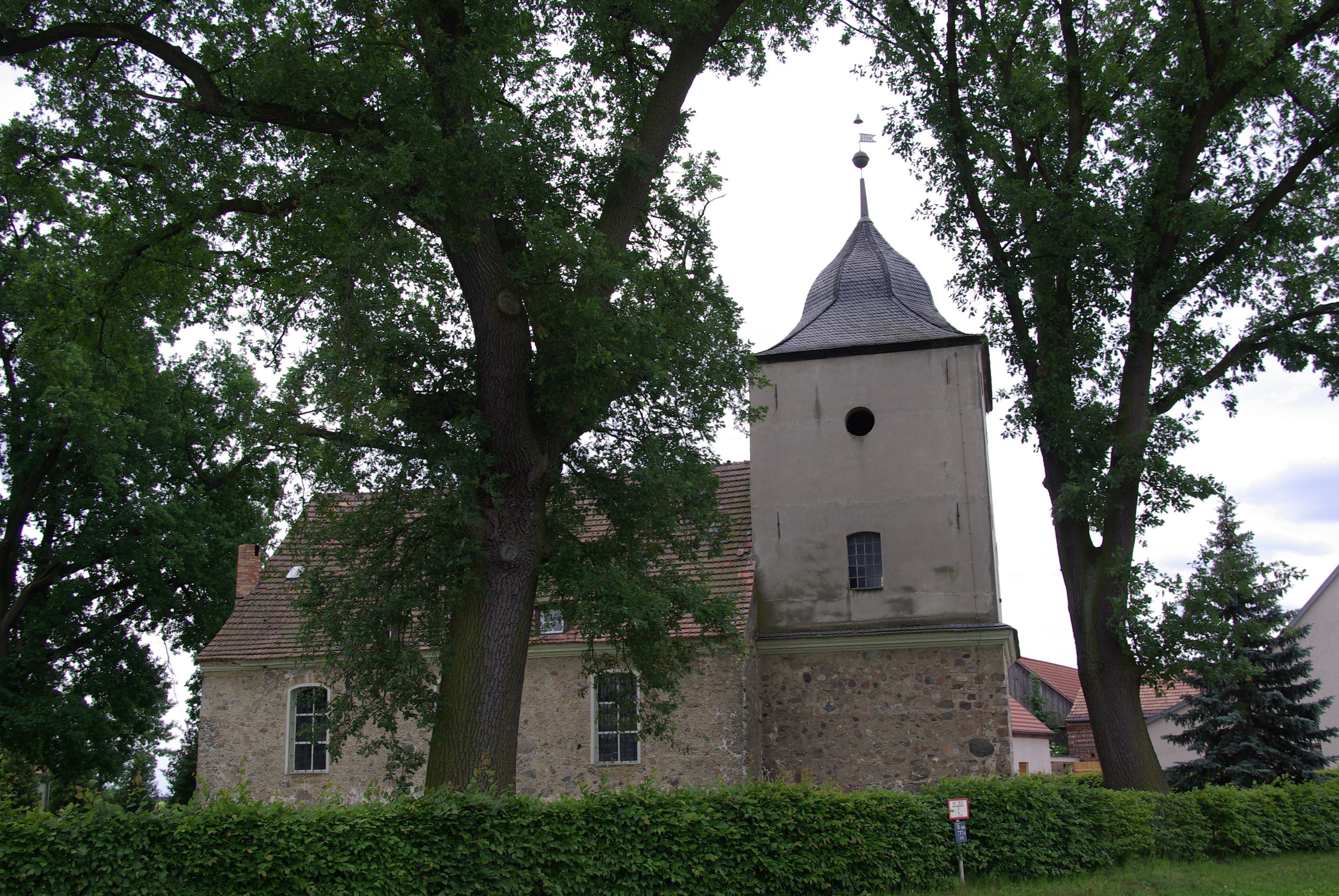 Friedland (Niederlausitz) in Brandenburg. Die Kirche im Ortsteil Niewisch steht unter Denkmalschutz.